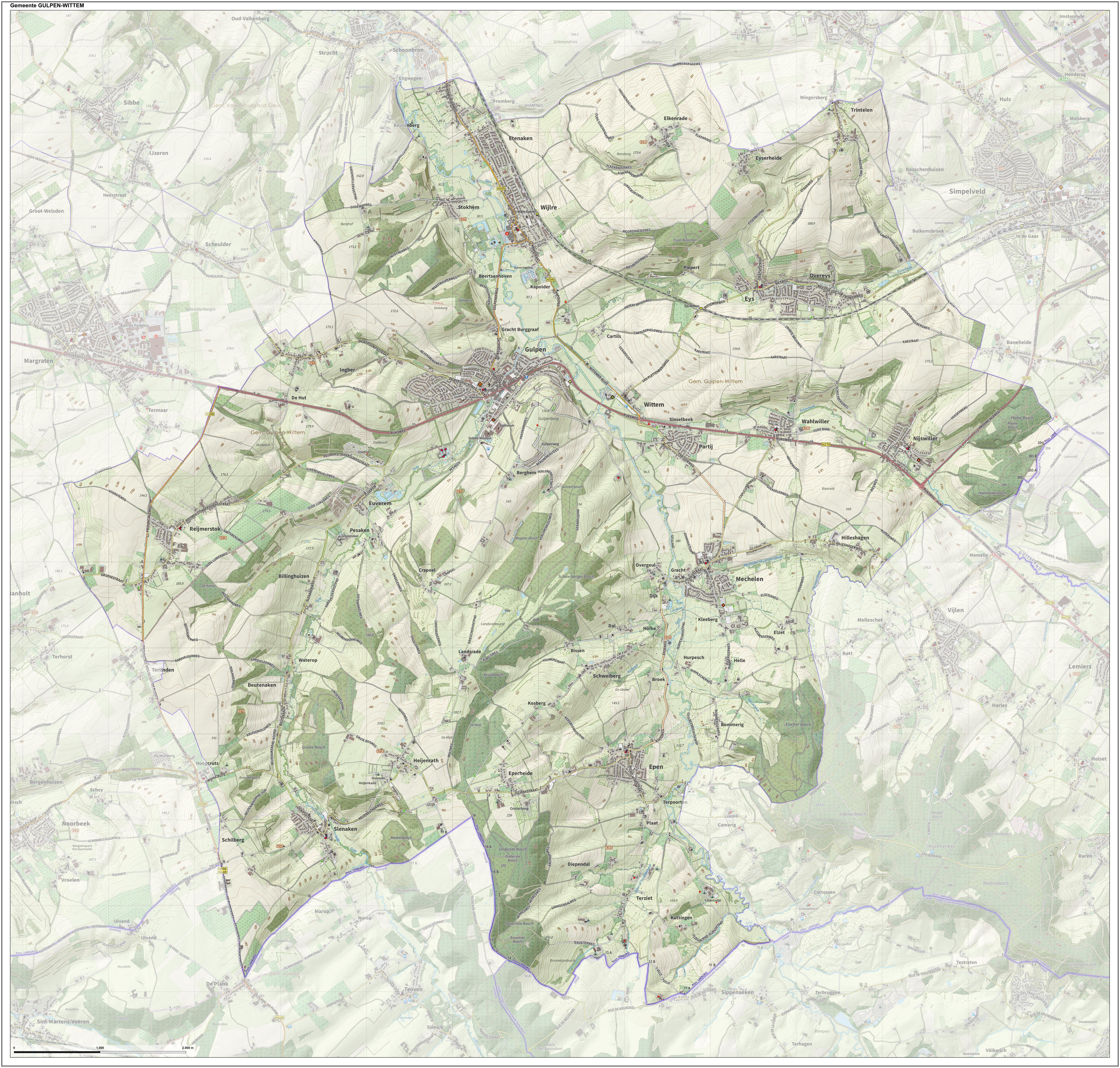 Topografische gemeentekaart. Resolutie: 400 pixels/km. Kaartbeeld samengesteld uit de open geodata van de Top10NL en Top25namen (Kadaster), Creative Commons-BY licentie. Gebouwvlakken uit open geodata BAG extract. Wegen uit de OpenStreetMap, OpenStreetMap community. Reliëfschaduw uit de Actuele Hoogtekaart AHN2. Samenstelling en kleurenschema: Jan-Willem van Aalst, met QGIS. Zie ook de Legenda.